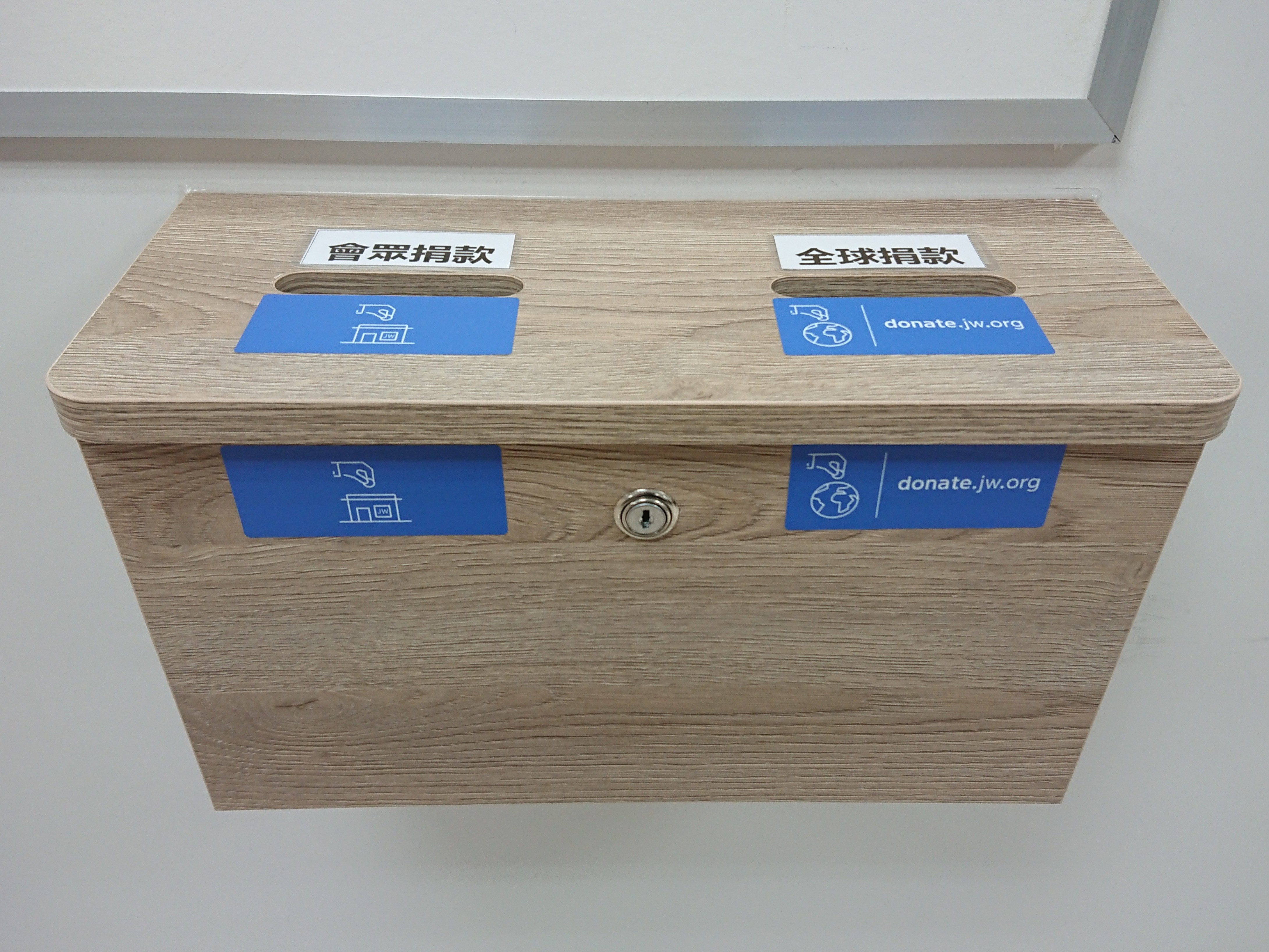 中文（中国大陆）: 基隆市仁爱区忠一路20号7楼，耶和华见证人王国聚会所基隆仁爱会众设置的奉献箱。奉献箱共有2个投入孔，为分别可选择奉献给基隆仁爱会众(或其他所在会众)或美国总部的传道工作。